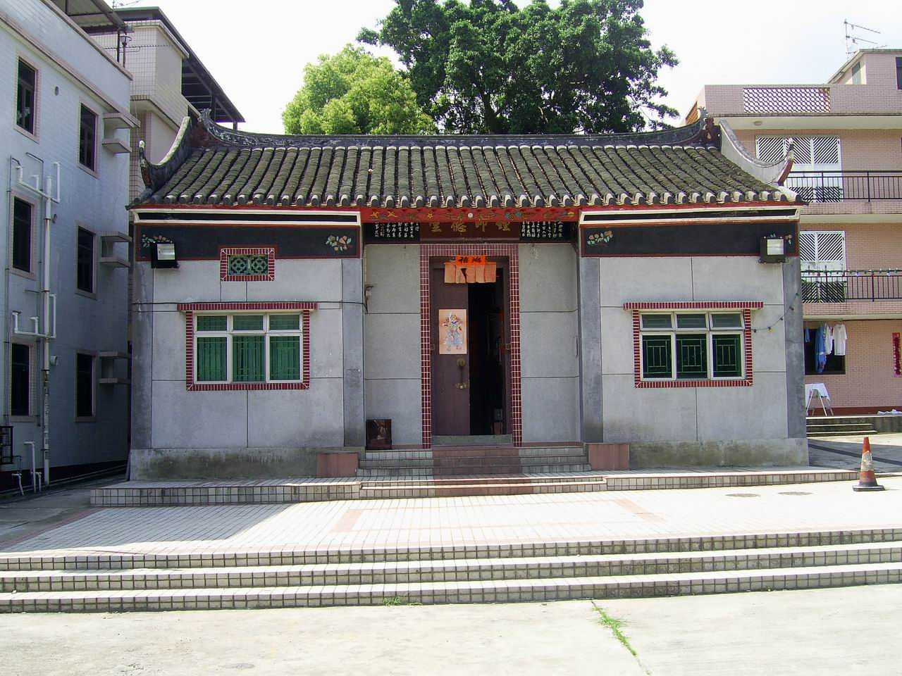 鍾屋村鍾氏祠堂